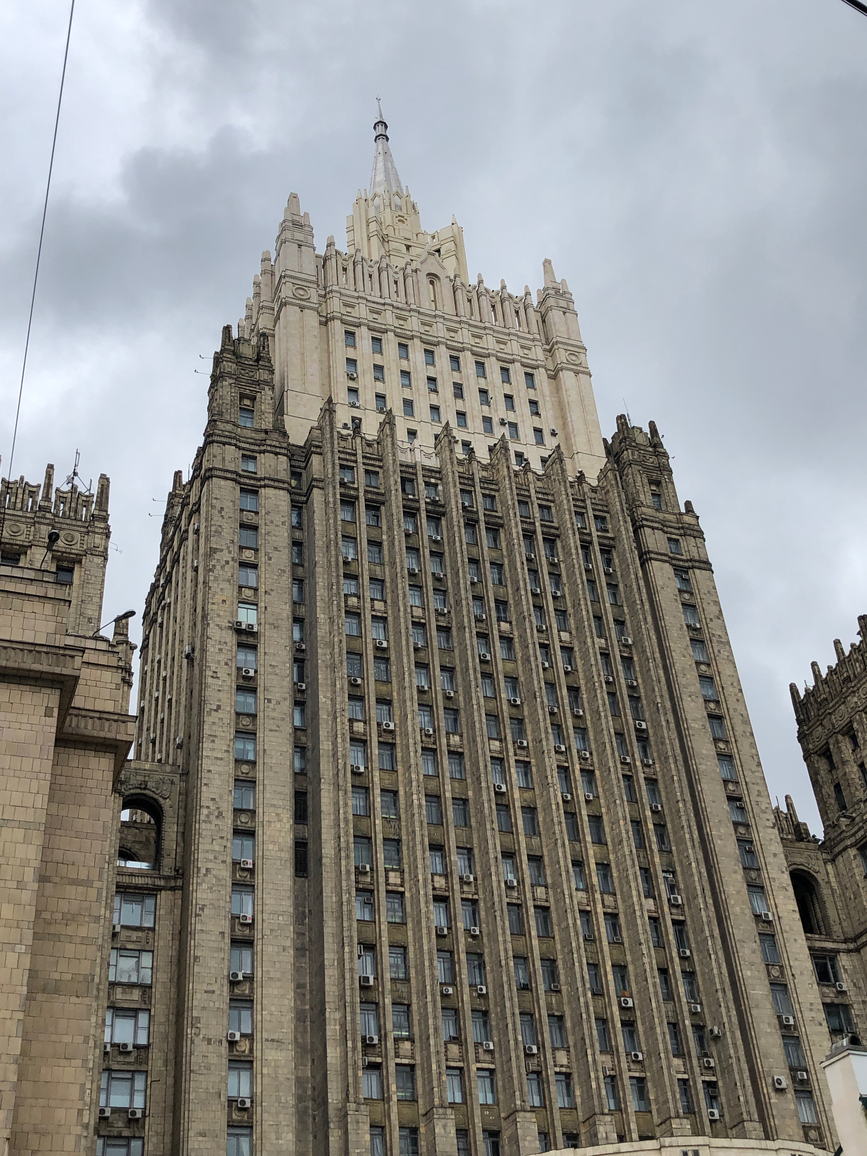 Министерство иностранных дел